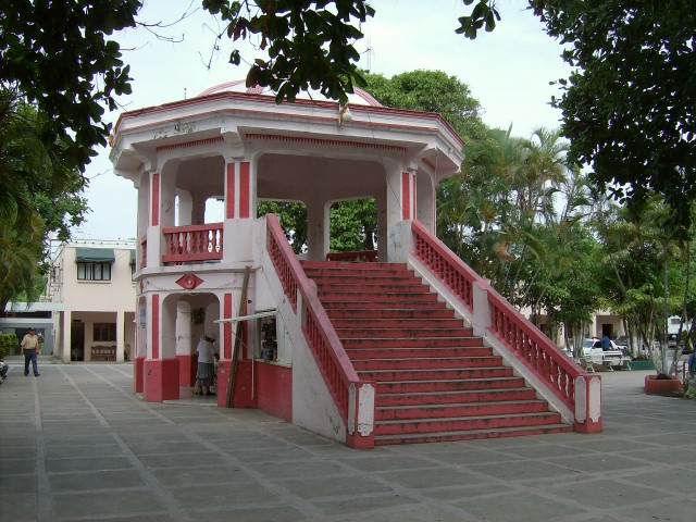 Kiosko en la plaza principal de Tamuín, México.